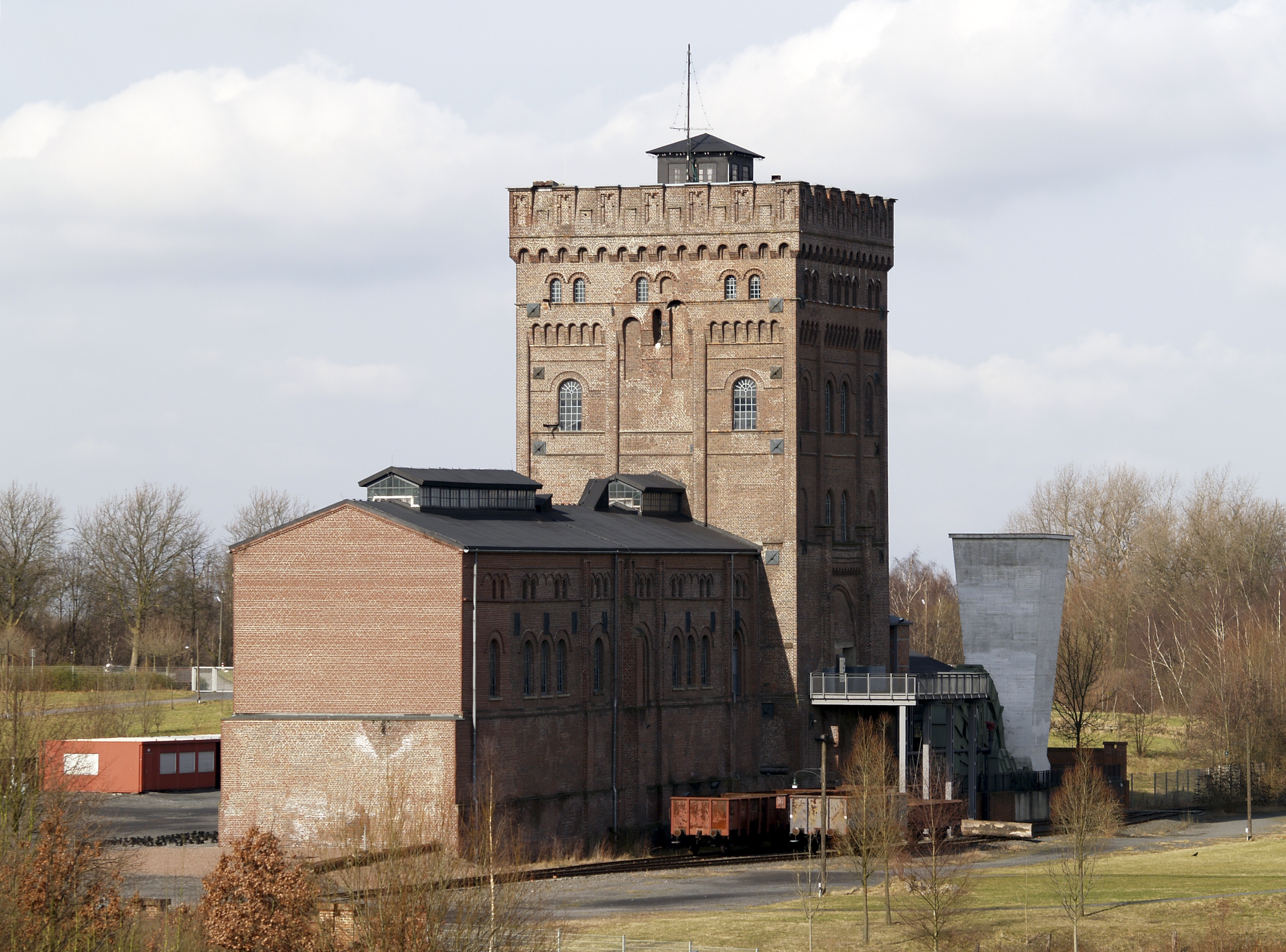 Zeche Hannover in Bochum, Maschinenhaus und Malakow-Turm über Schacht 1